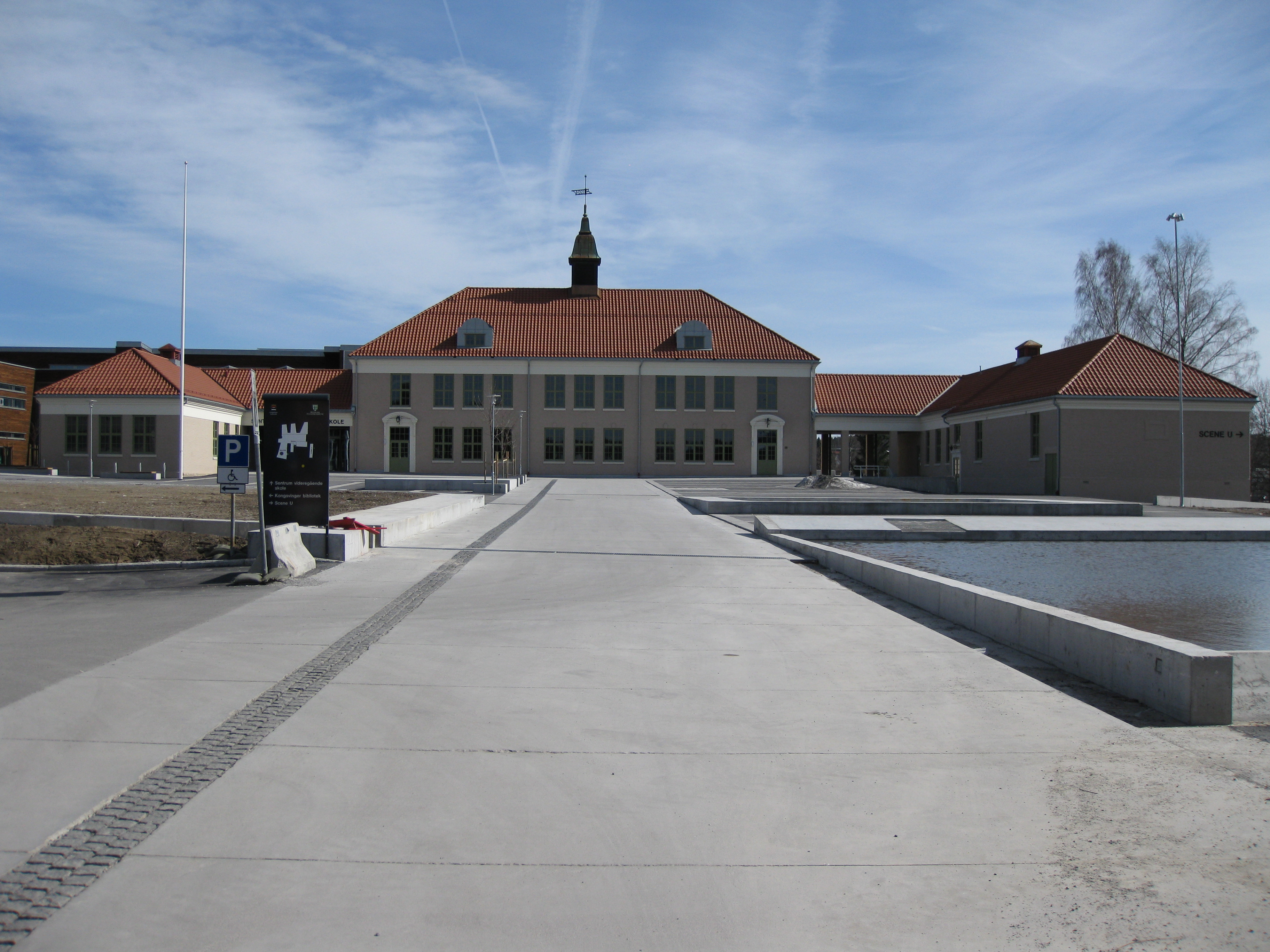 Sentrum videregående skole. Bygningen tilhørte tidligere Kongsvinger sentralskole. Senere ombygd og tatt i bruk av Sentrum VGS i 2009.